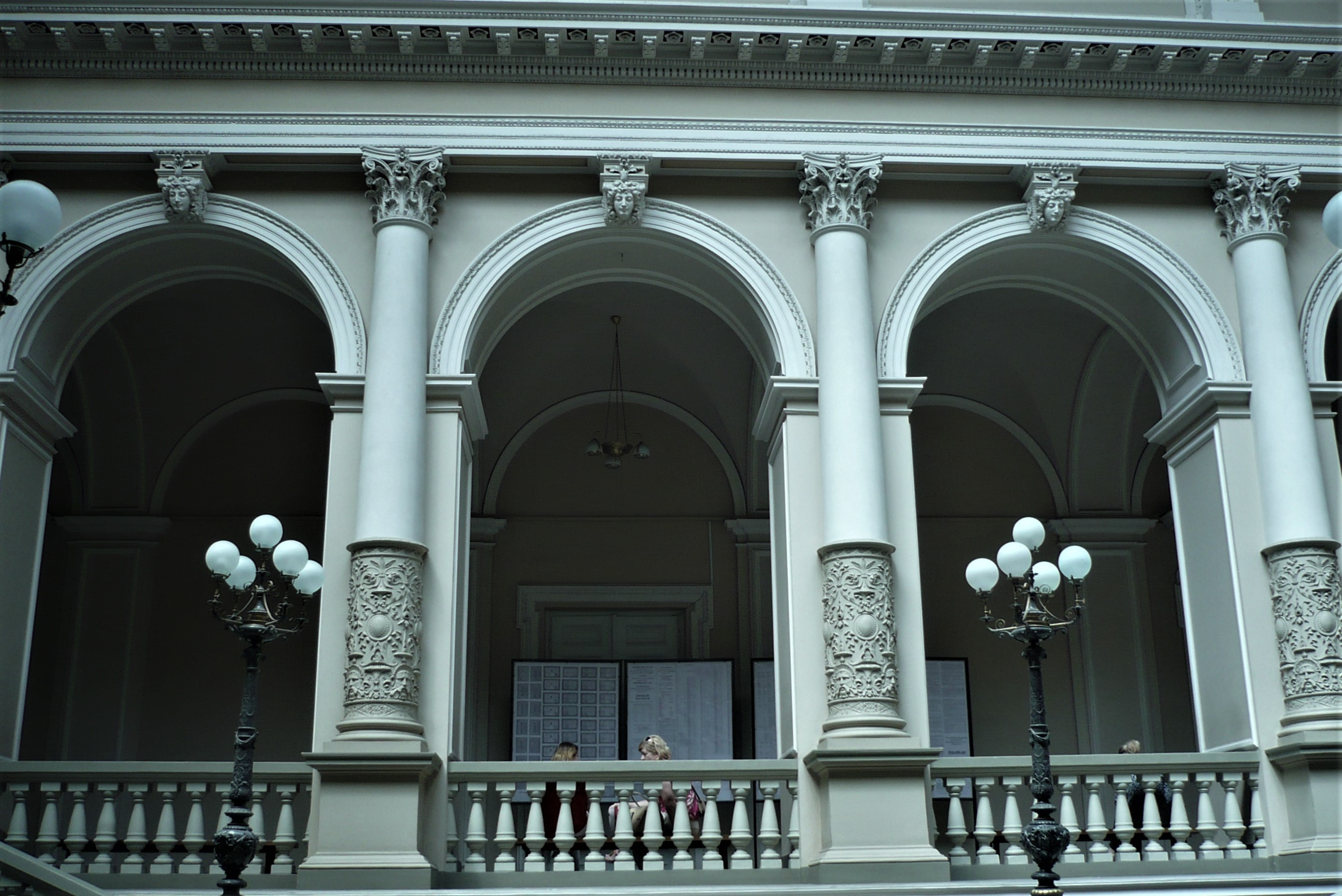 Lwowski Uniwersytet Narodowy im. Iwana Franki. Hol